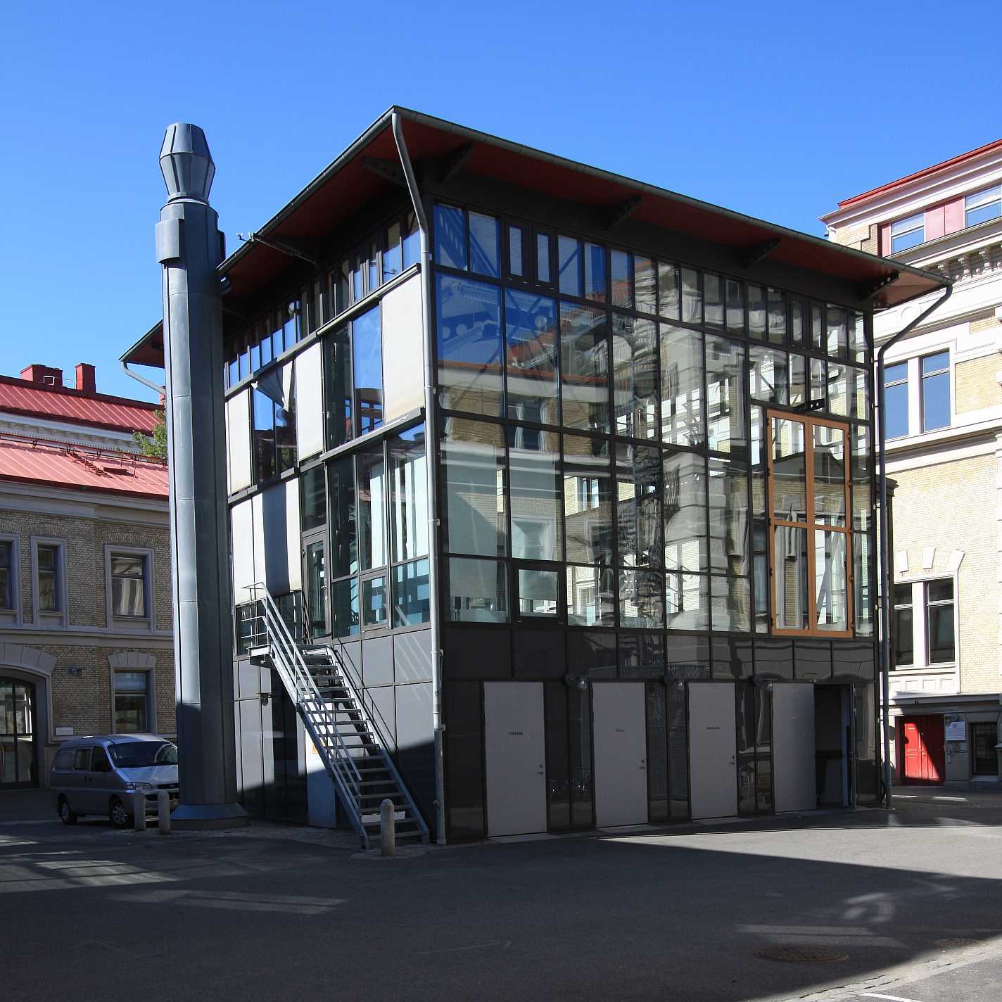 Modernes Stahl- und Glasgebäude im Innenhof der Hochschule für Fotografie. Ost- und Südfassaden.